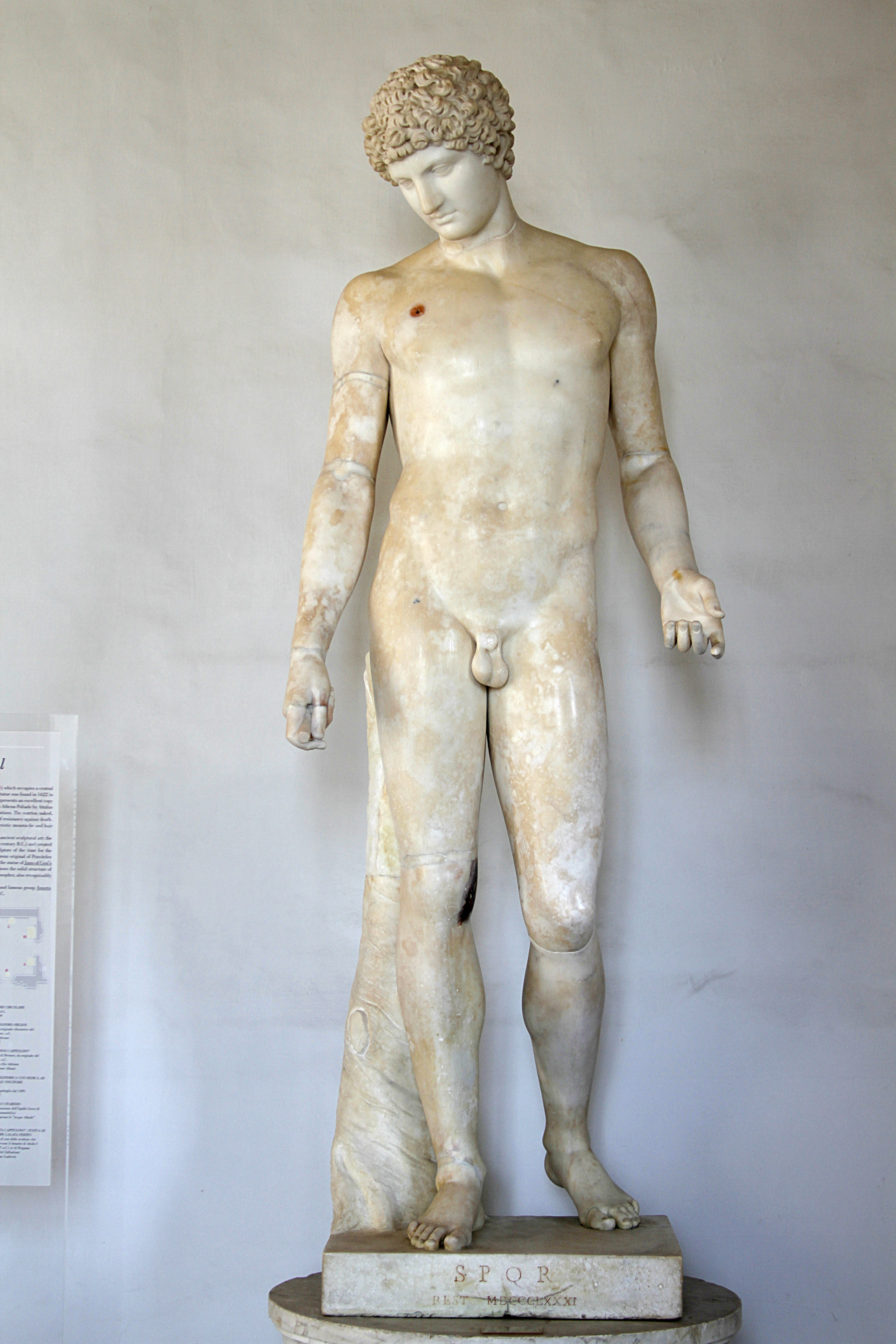 Palazzo Nuovo - Musei Capitolini - Rome